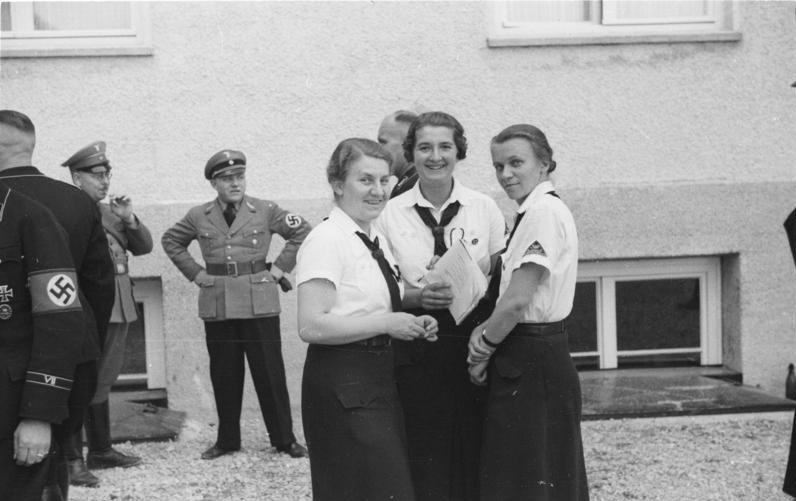 KZ Dachau, Besuch von BDM-Führerinnen Konzentrationslager Dachau.- Besuch von BDM-Führerinnen und politischen Leitern (insbesondere Heinrich Himmler und Martin Bormann) bei der SS in Dachau, 8.5.1936